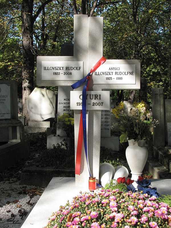 Illovszky Rudolf (Budapest, 1922. február 21. – Budapest, 2008. szeptember 23.) magyar labdarúgó, edző, a magyar labdarúgó-válogatott volt szövetségi kapitánya, felesége és fia, Illovszky György (1950-2007) szintén sportoló sírja Budapesten. Farkasréti temető: 1-1-170.